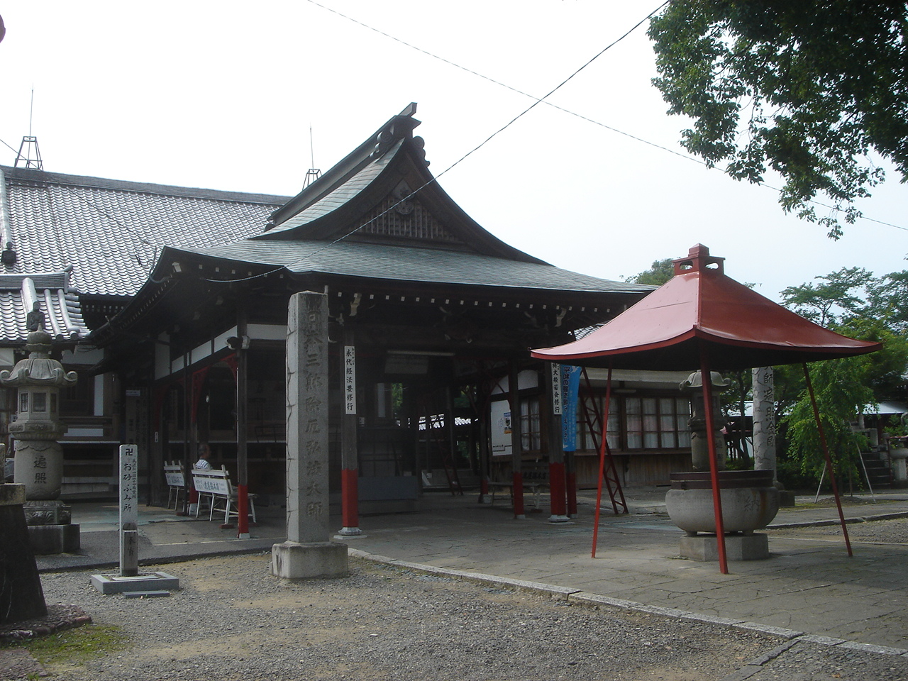 Osshinji(Temple)(乙津寺),Gifu,Gifu,Japan(岐阜県岐阜市)で撮影